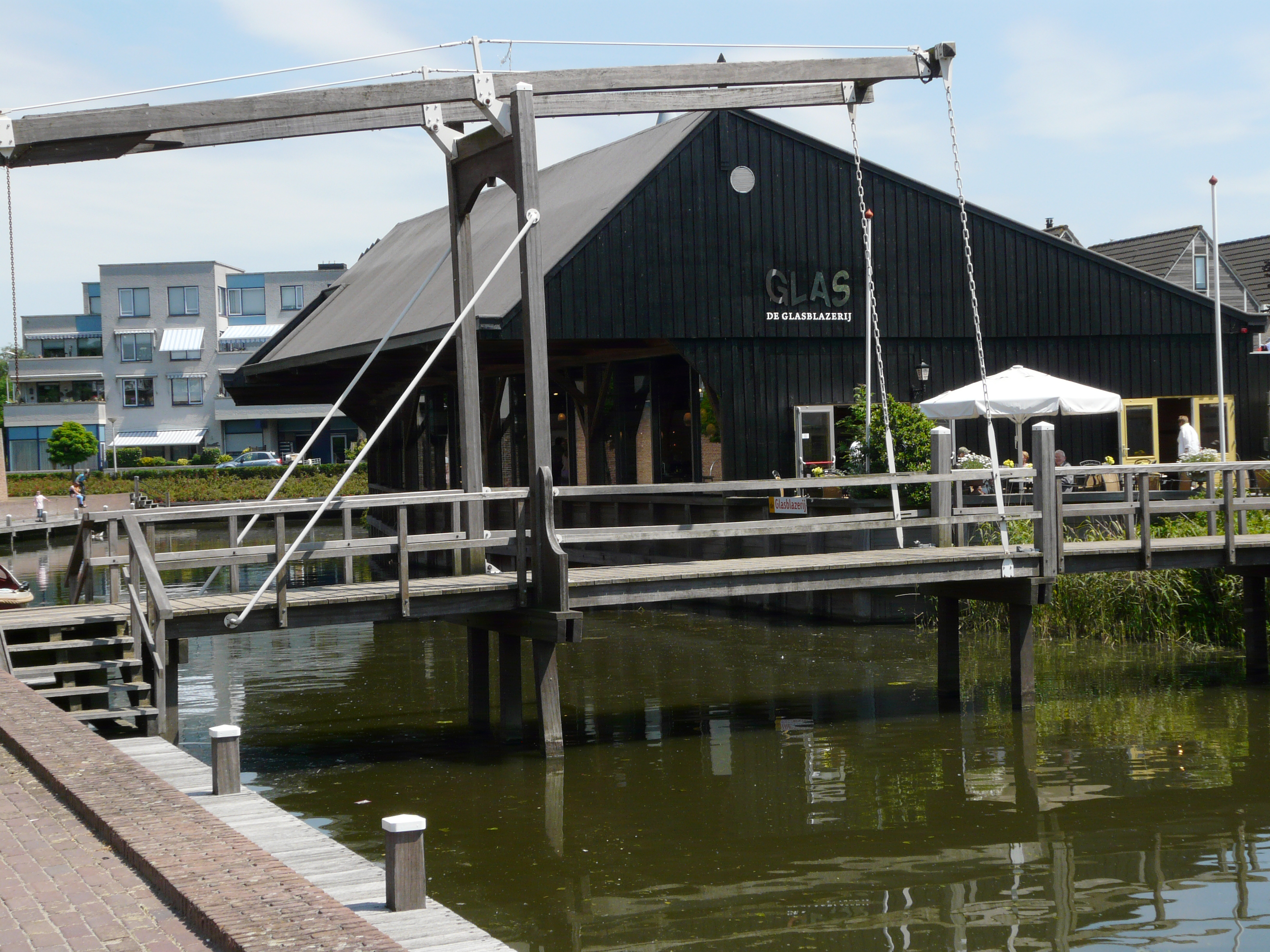 Zicht op een deel van het Glascentrum Leerdam met de Glasblazerij onderdeel van het Nationaal Glasmuseum gevestigd aan de Zuidwal, 4141 BE Leerdam. Bereikbaar via de brug. Gelegen nabij de haven van Leerdam.